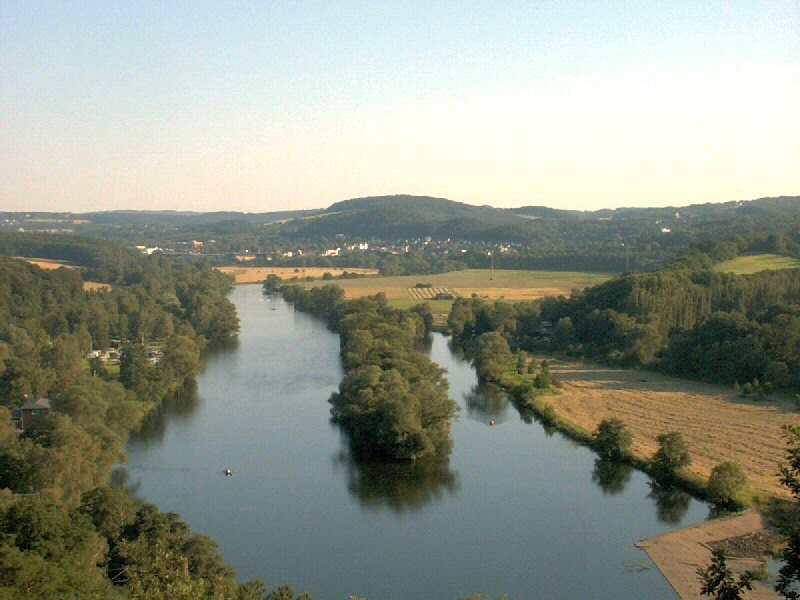 Blick vom Bergerdenkmal Witten auf das Ruhrtal mit der RWE Insel in der Bildmitte und dem NSG Ruhraue Witten-Gedern im Hintergrund